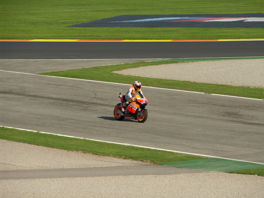 Casey Stoner disputando su última carrera